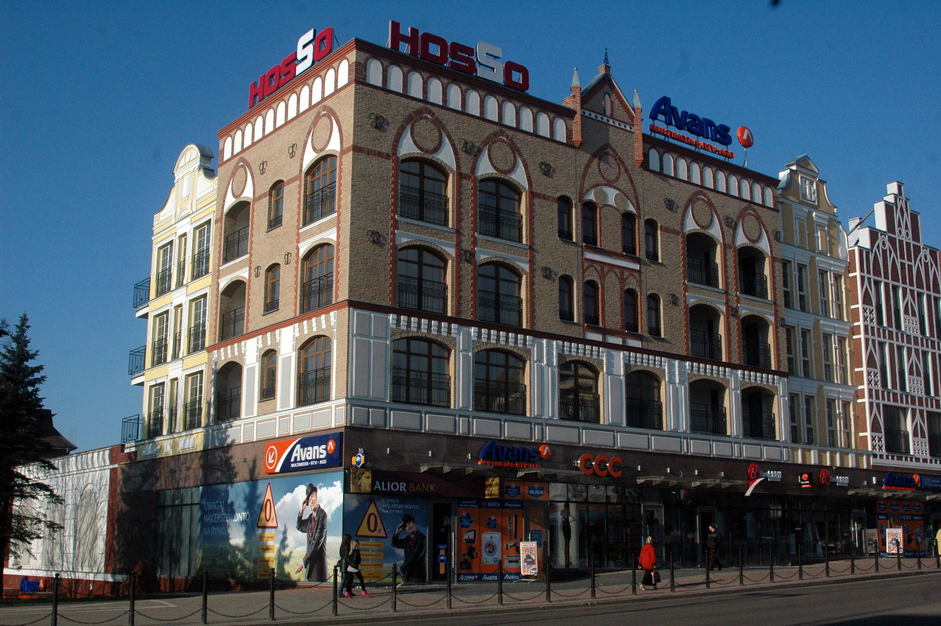 Galeria Hosso w Koszalinie